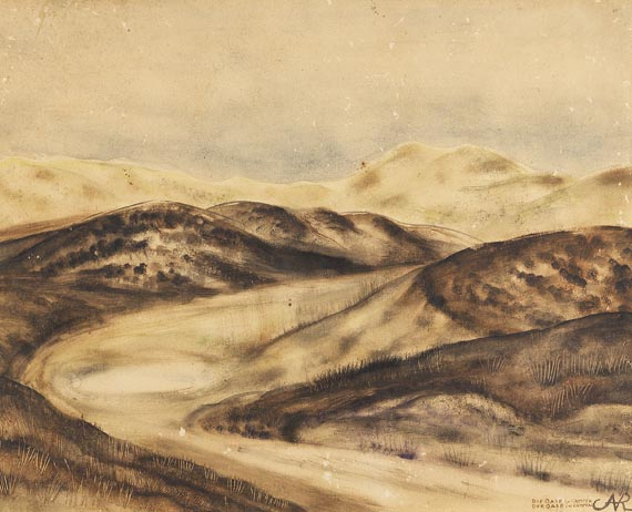 "Die Oase in Kampen". Aquarell. 38 x 47 cm (Blattgröße)